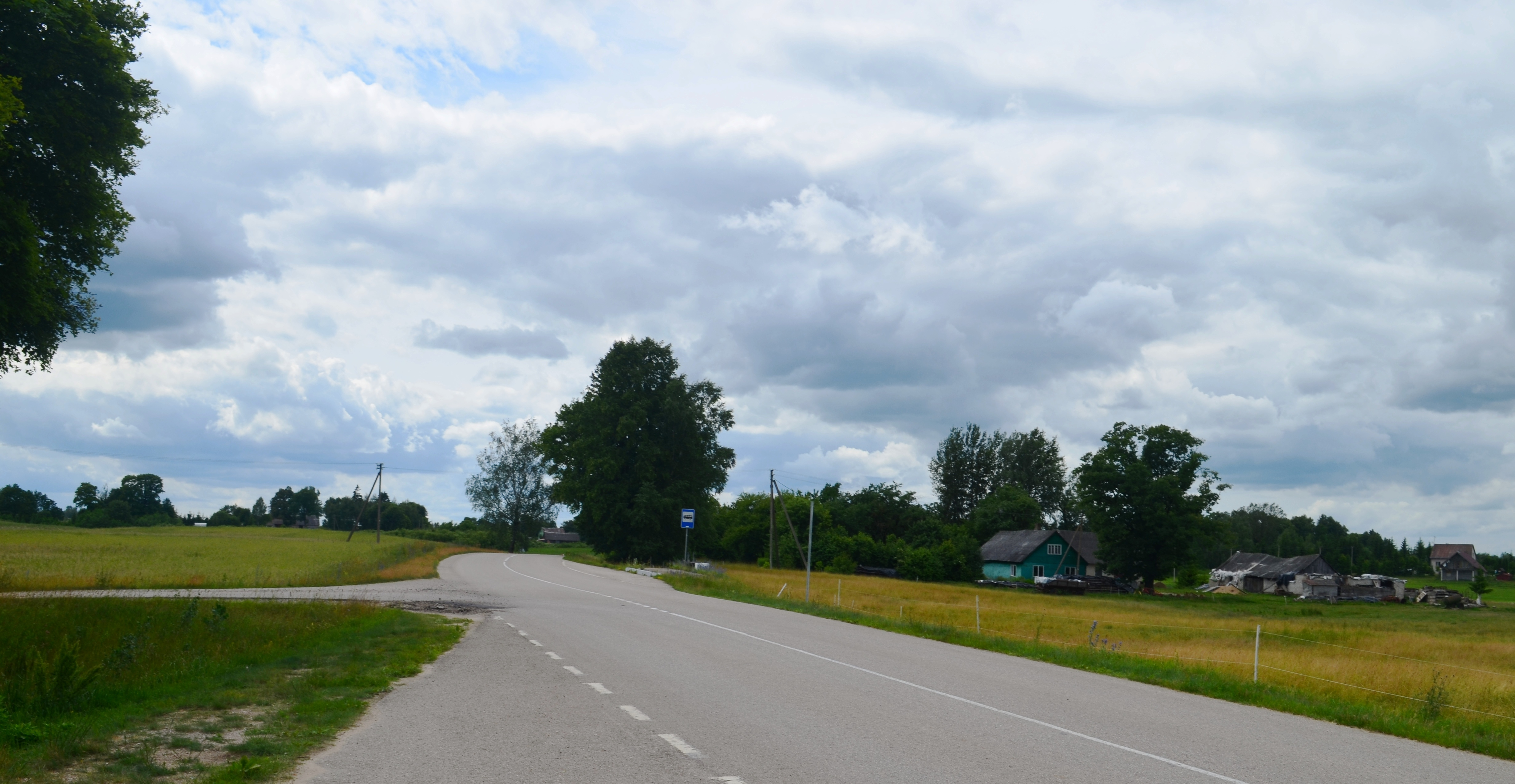 Cigoniškiai, Alytaus raj.